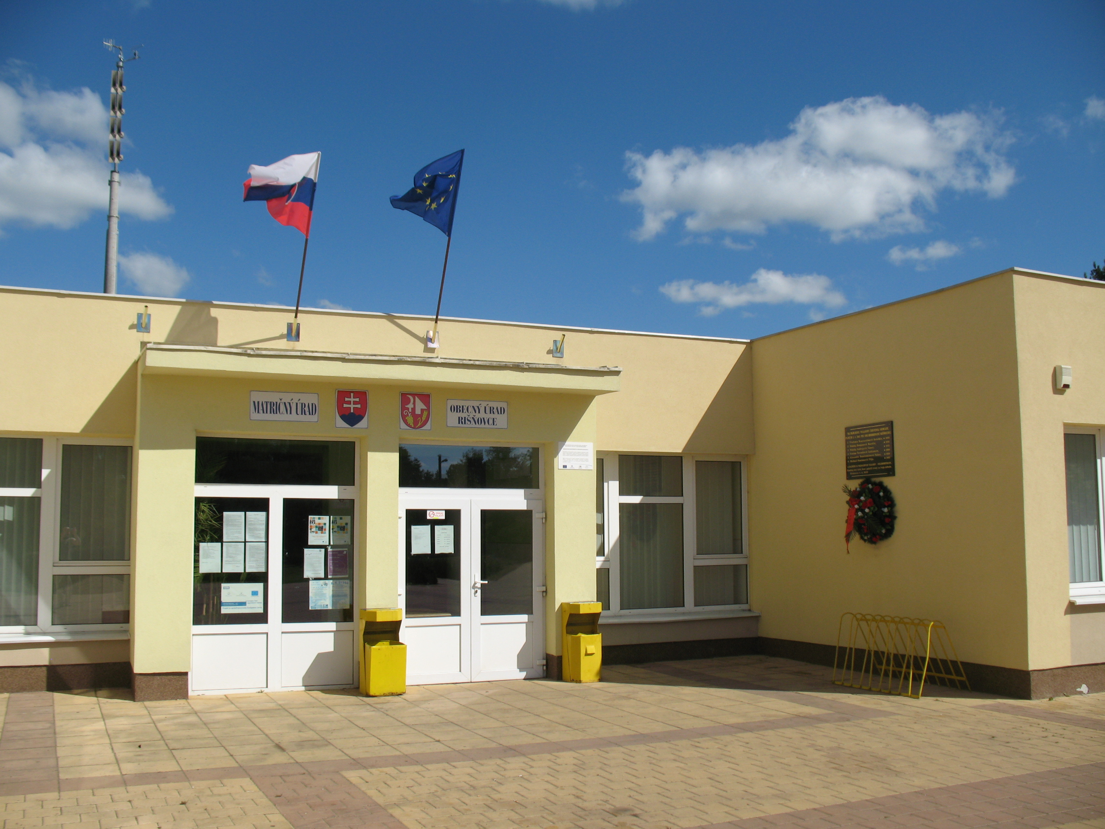 Récsény